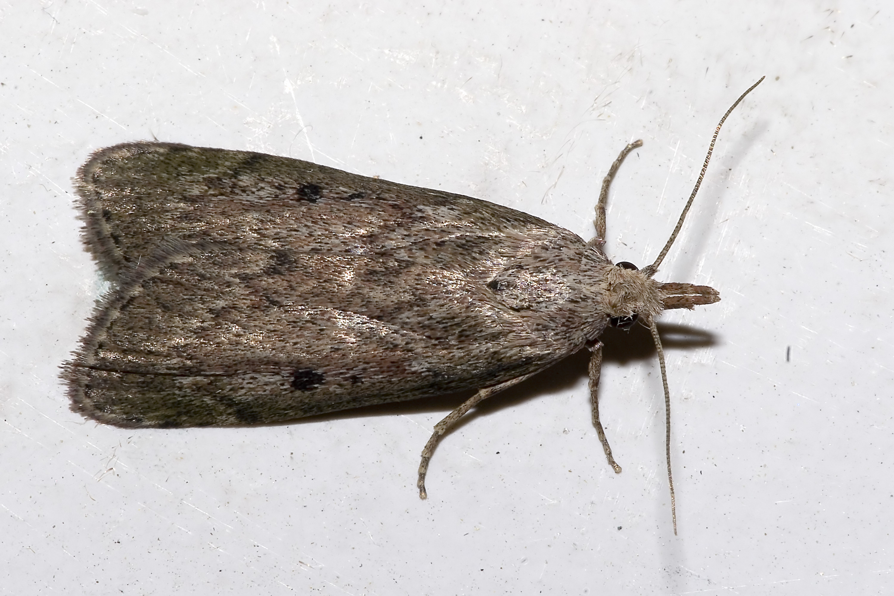 Aphomia sociella (Linnaeus, 1758)